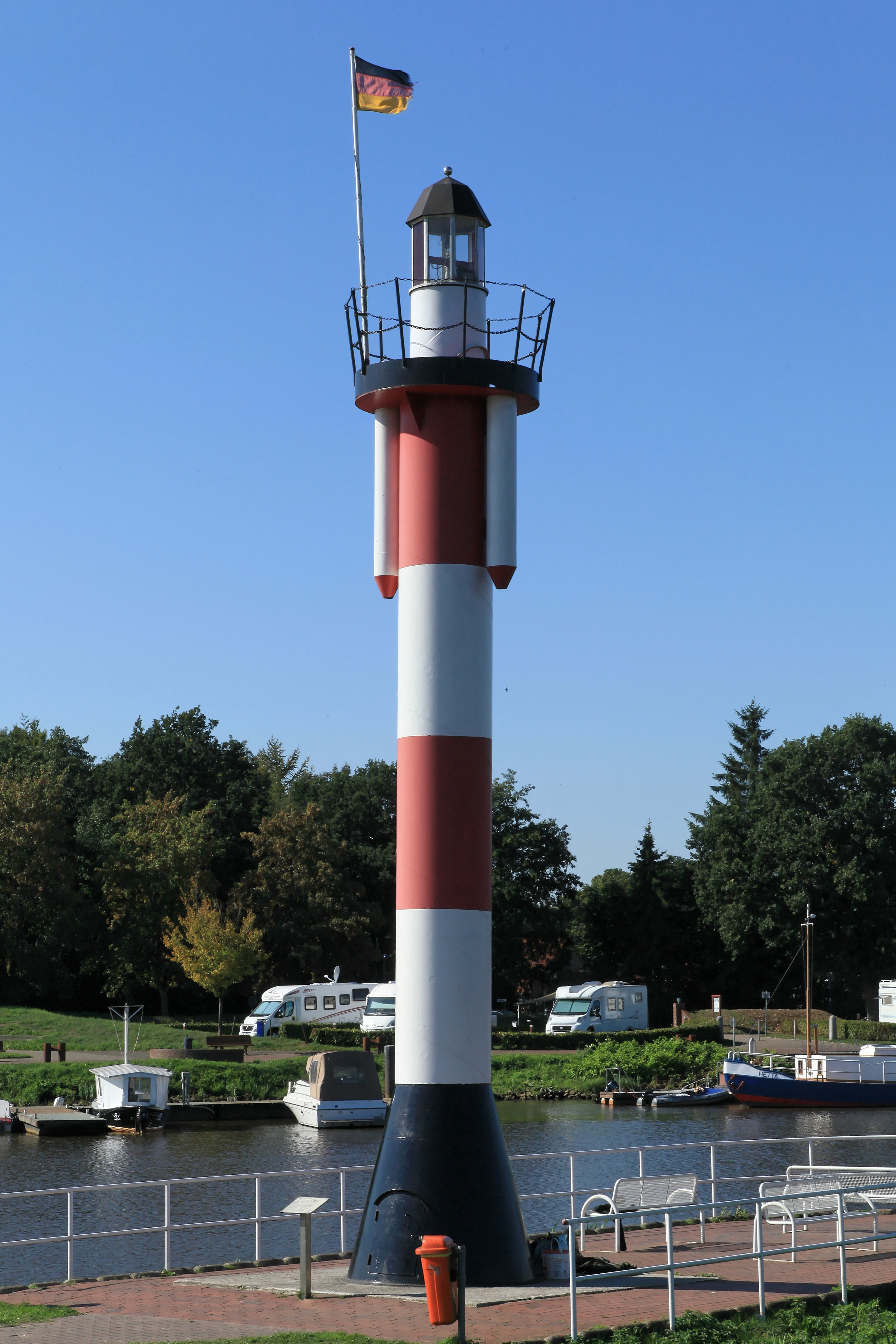 Blick von der Soeste-Hafenbrücke zum Leuchtturm, Bootshafen in Barßel